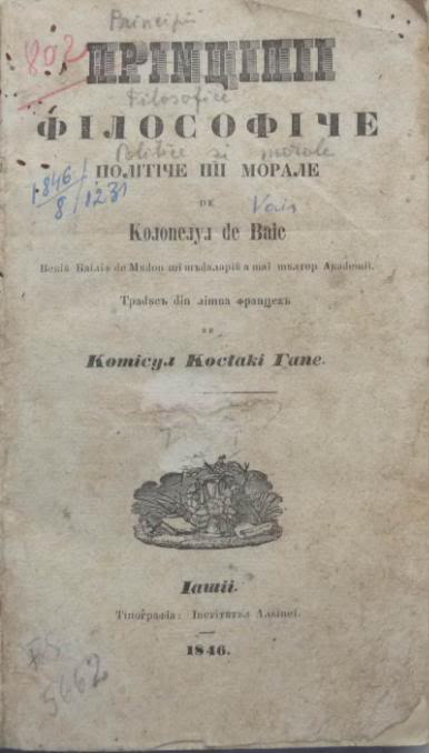 ”Prinţipii filosofice, politice şi morale” de François-Rodolphe Weiss, traducere publicată în 1846 la Iași